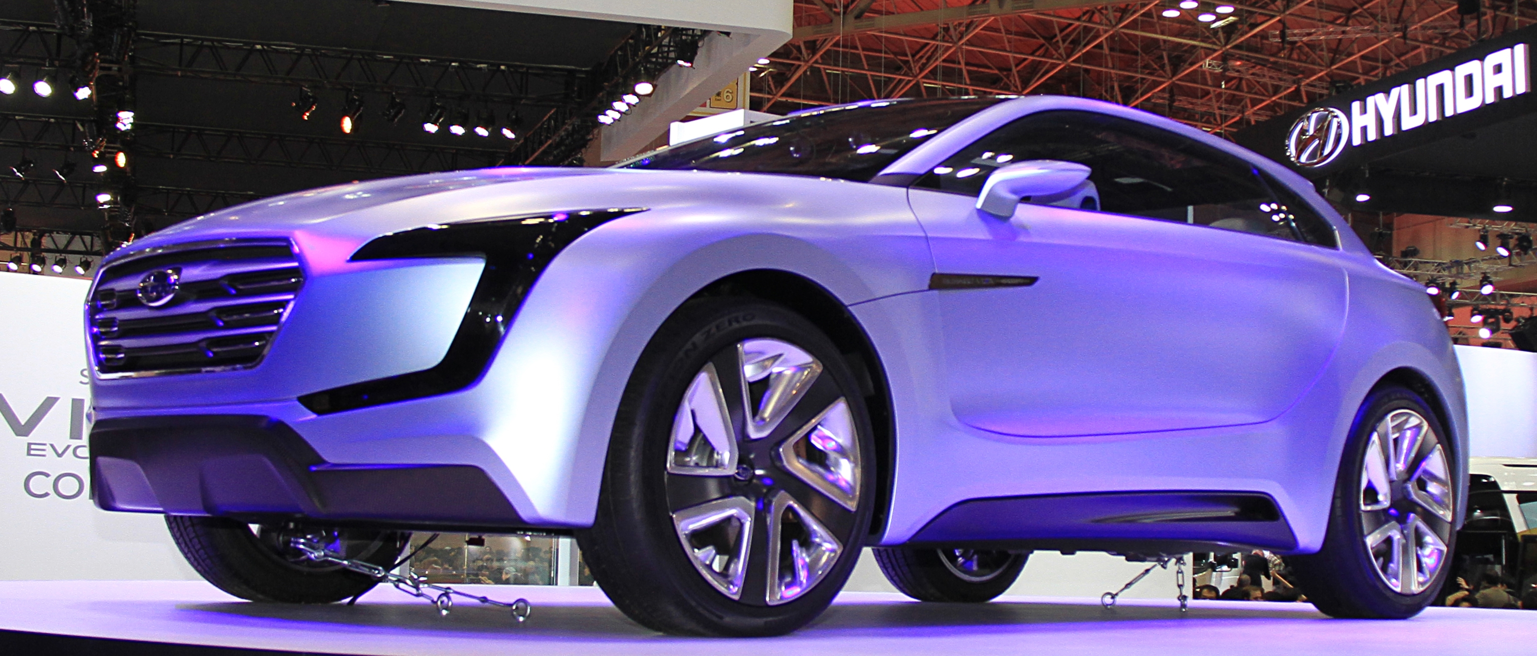 Subaru Visiv Concept